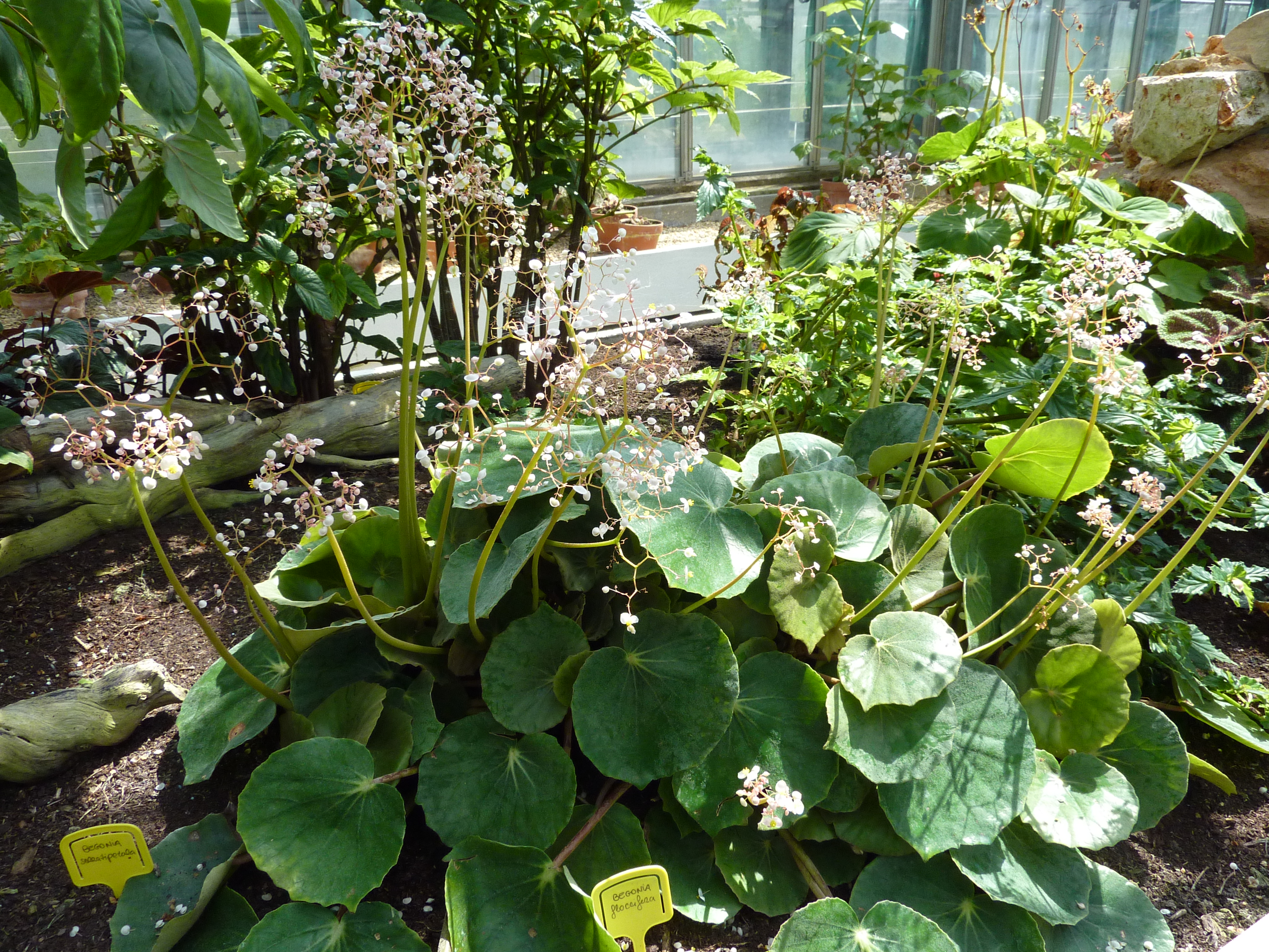 Begonia floccifera. Serres d'Auteuil- Jardin botanique de la Ville de Paris - France